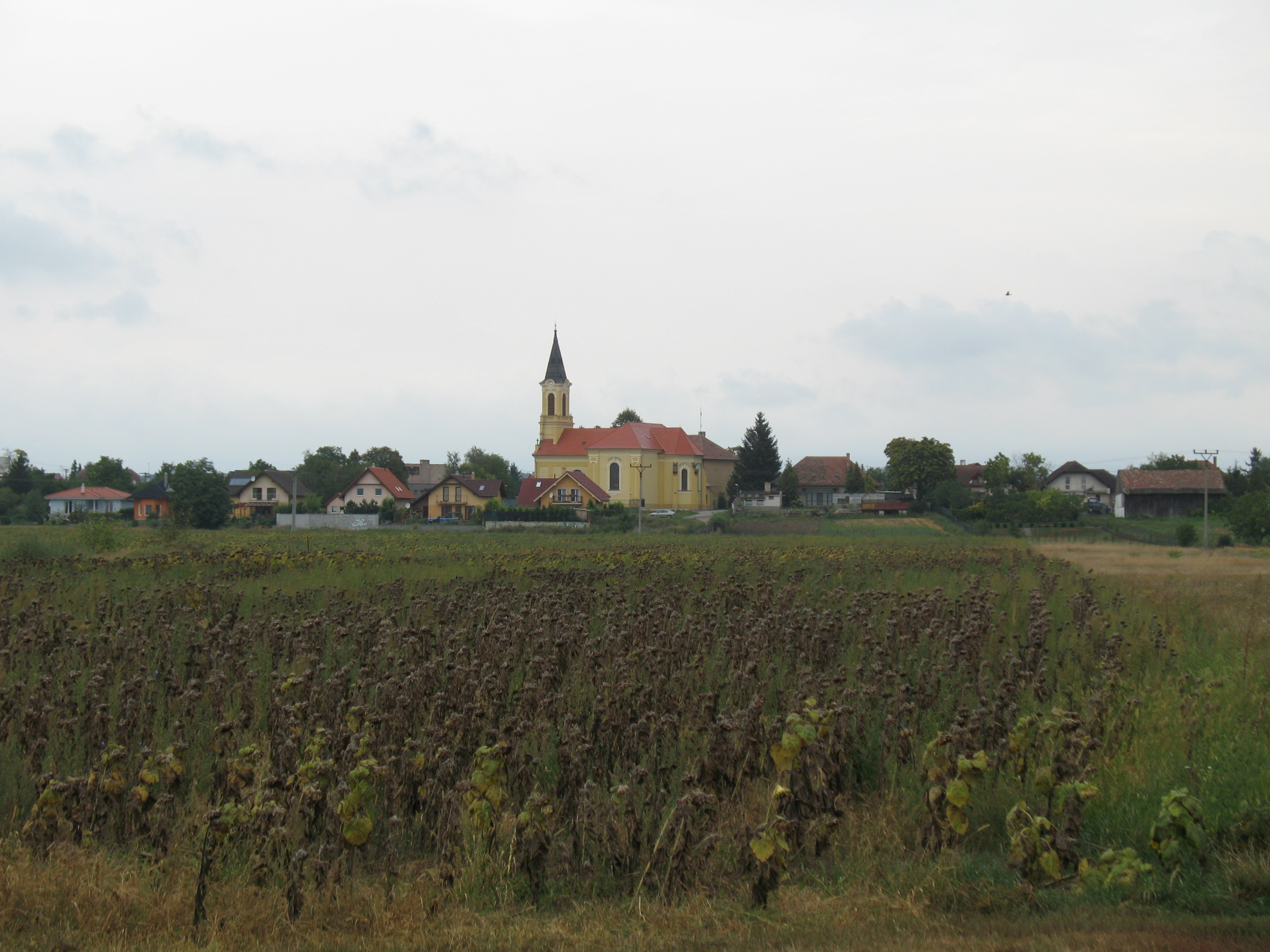 Magyarbél